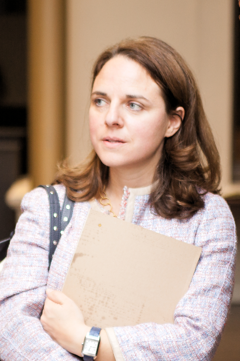 D'Ministesch Corinne Cahen den 2. Oktober 2014 beim Vernissage vun der Ausstellung «Quand Differdange devint "judenrein". Le jour où nos chemins se séparèrent».